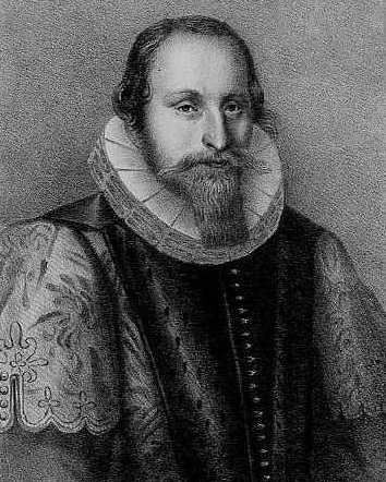 Prof.mr.dr. Marcus Lycklama (1573-1625) (à Nijeholt tot Buckstede, Doezum en Sebaldeburen is onjuist)